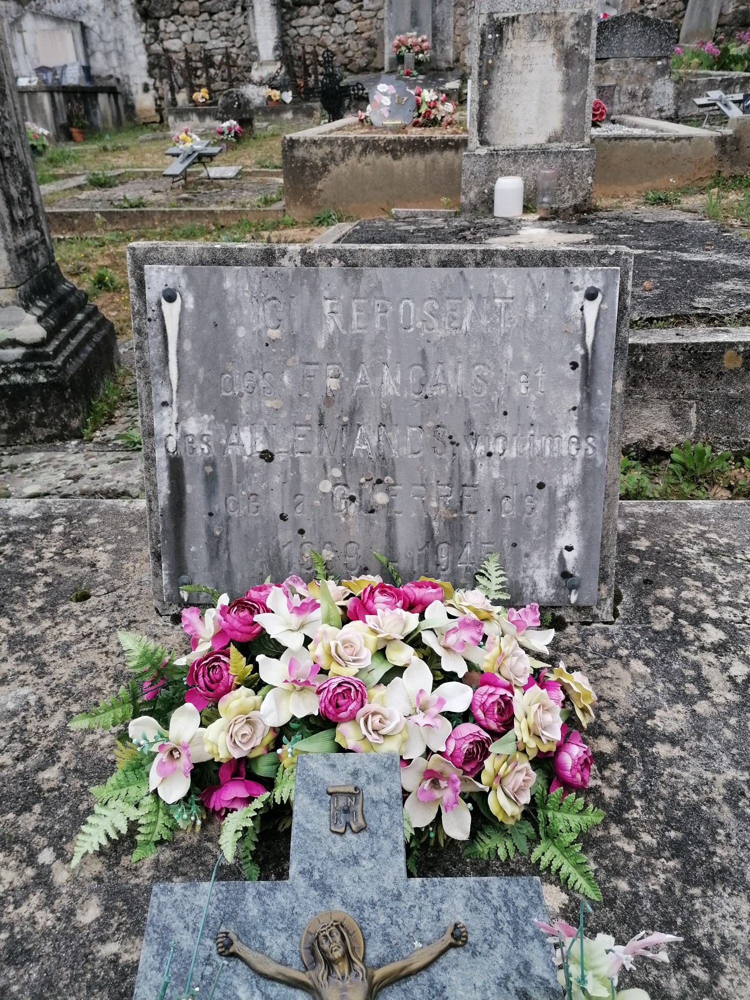 cette plaque témoigne de la volonté de réconciliation de la présidence du Général De Gaulle.